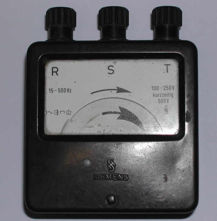 Drehfeldmessgerät